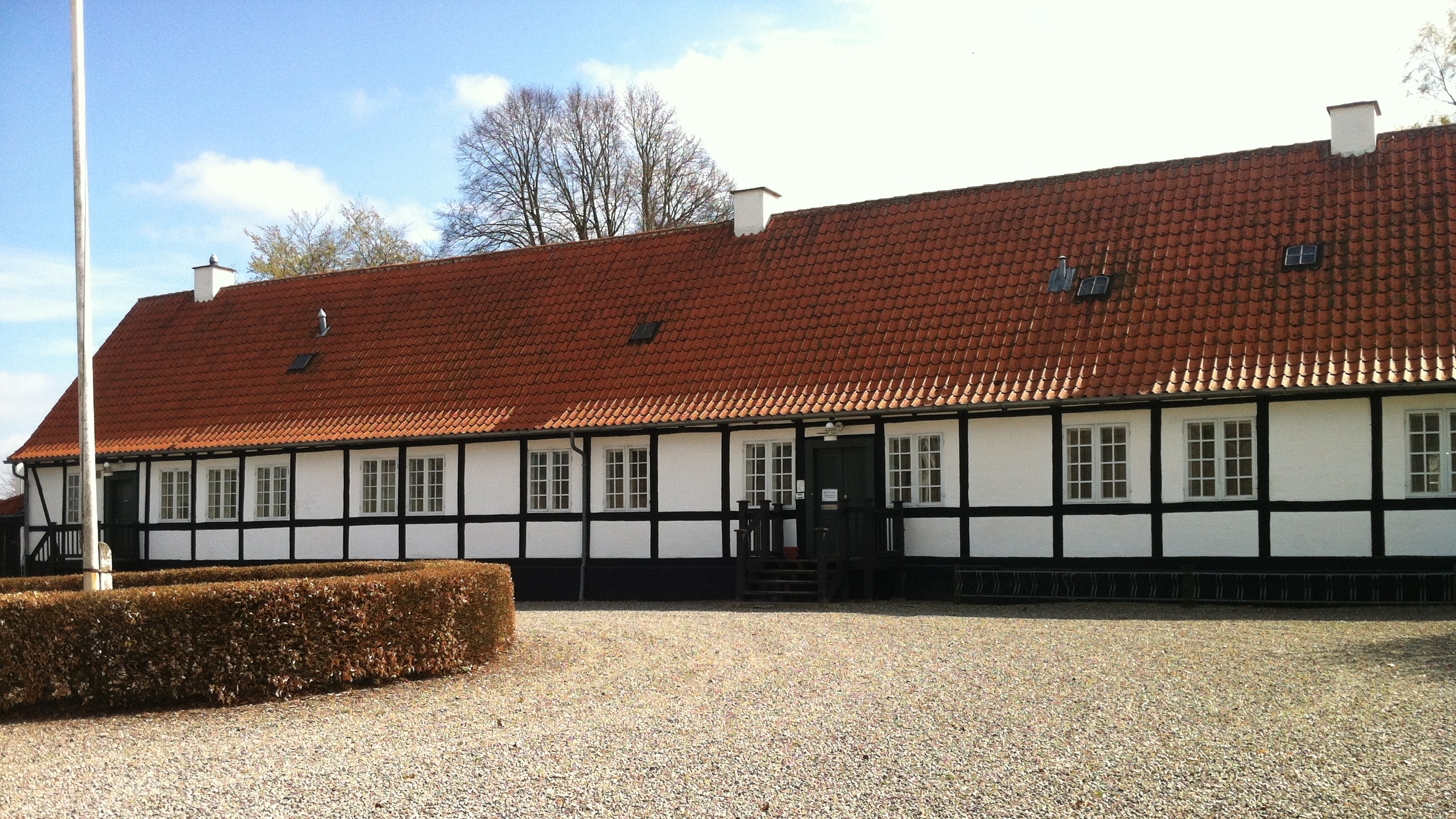 Jyderup Præstegård